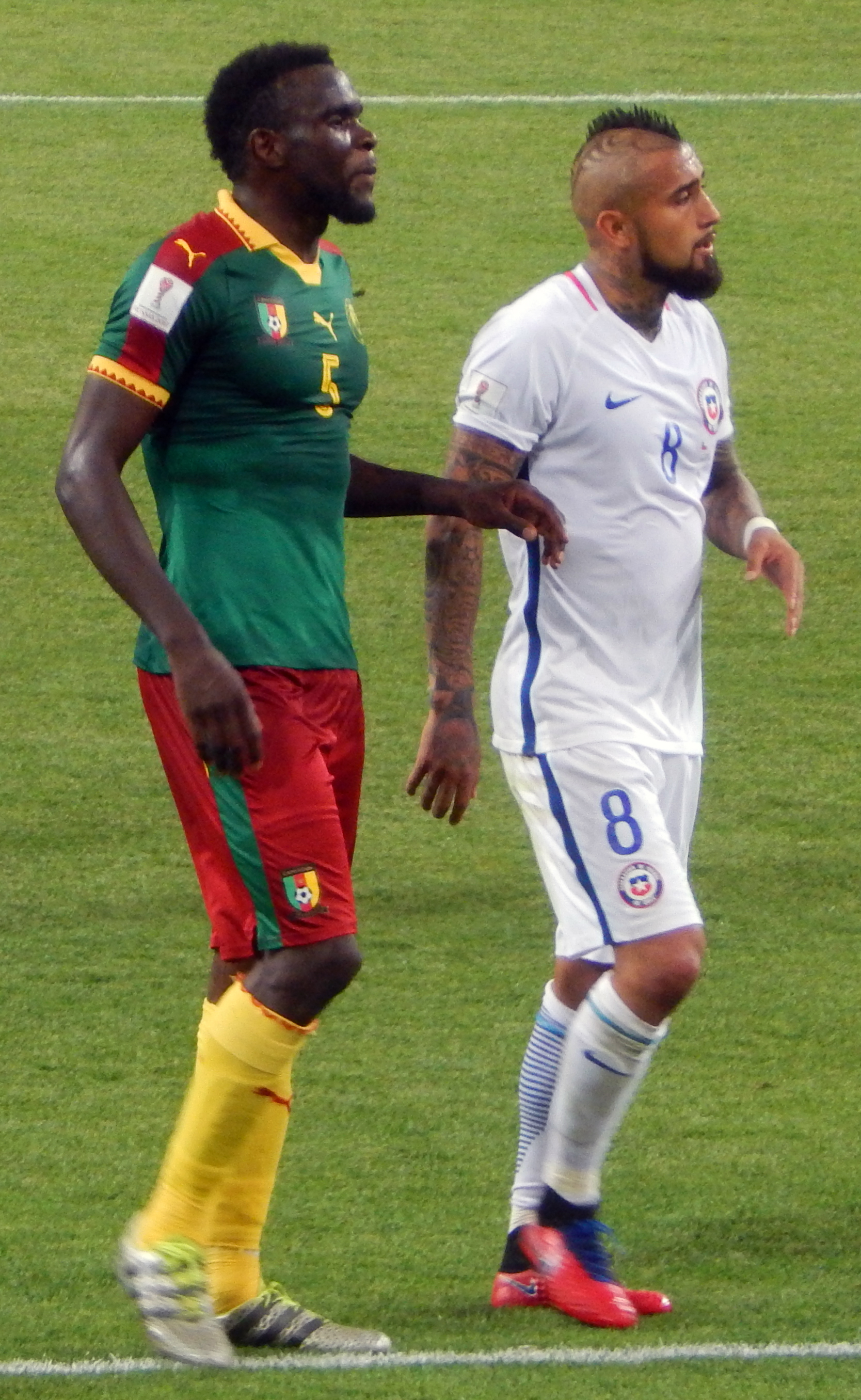 Майкл Нгадё-Нгаджюи и Артуро Видаль